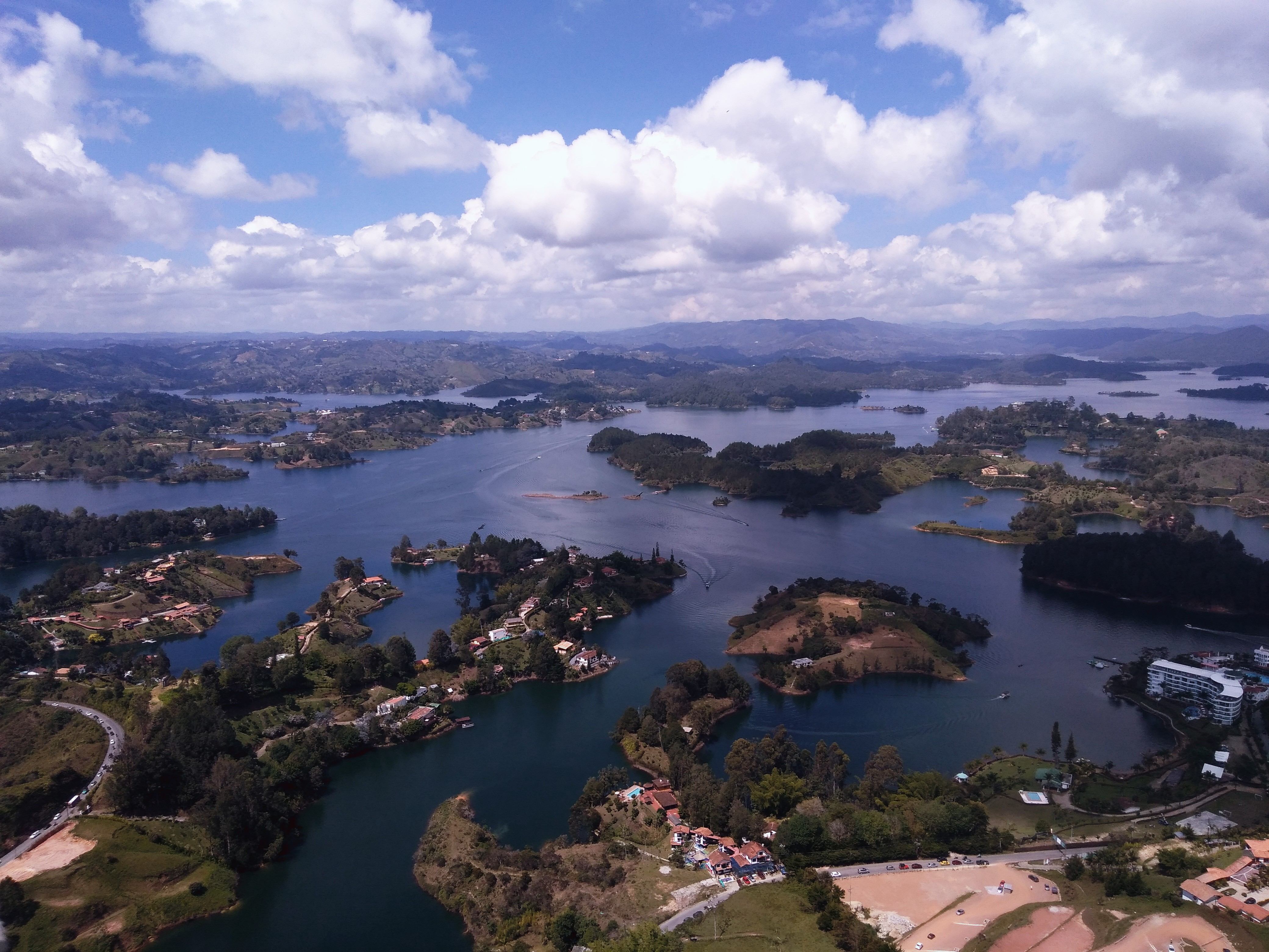 Esta fotografía fue tomada en el municipio colombiano con código 05321.